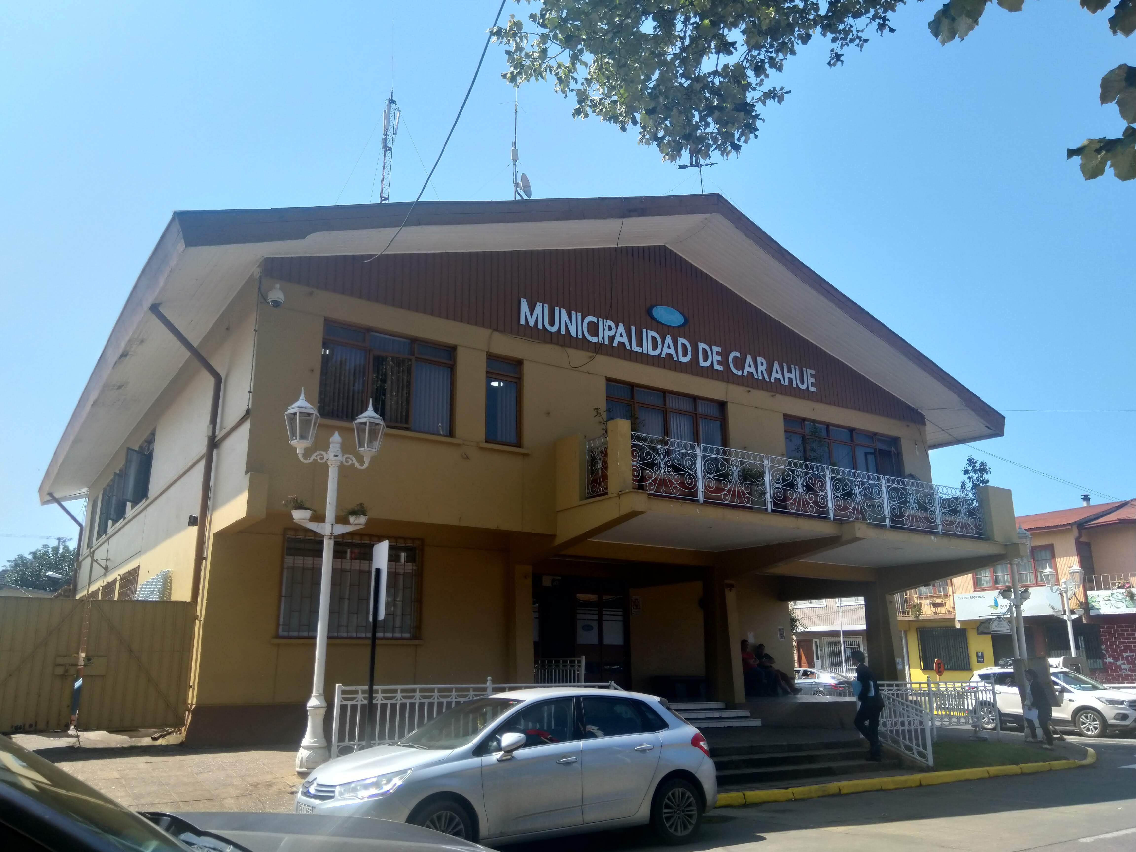 Frontis del edificio de la Municipalidad de Carahue. Región de la Araucania